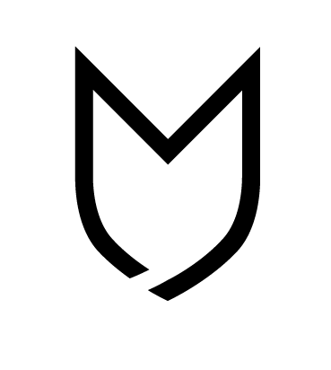 monogram